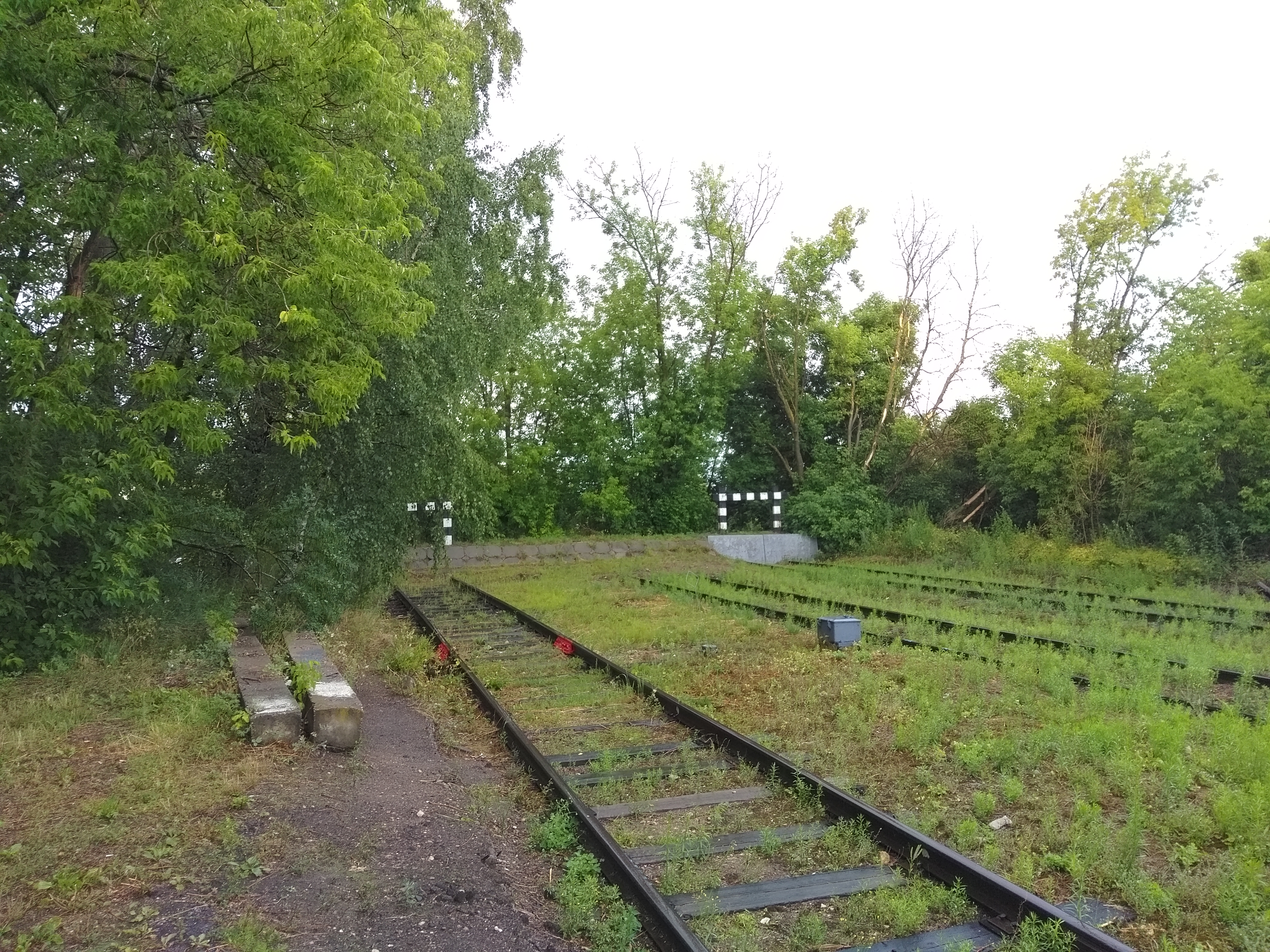 Железнодорожный тупик на линии Иваново - Кинешма, станция Кинешма, город Кинешма, Ивановская область.